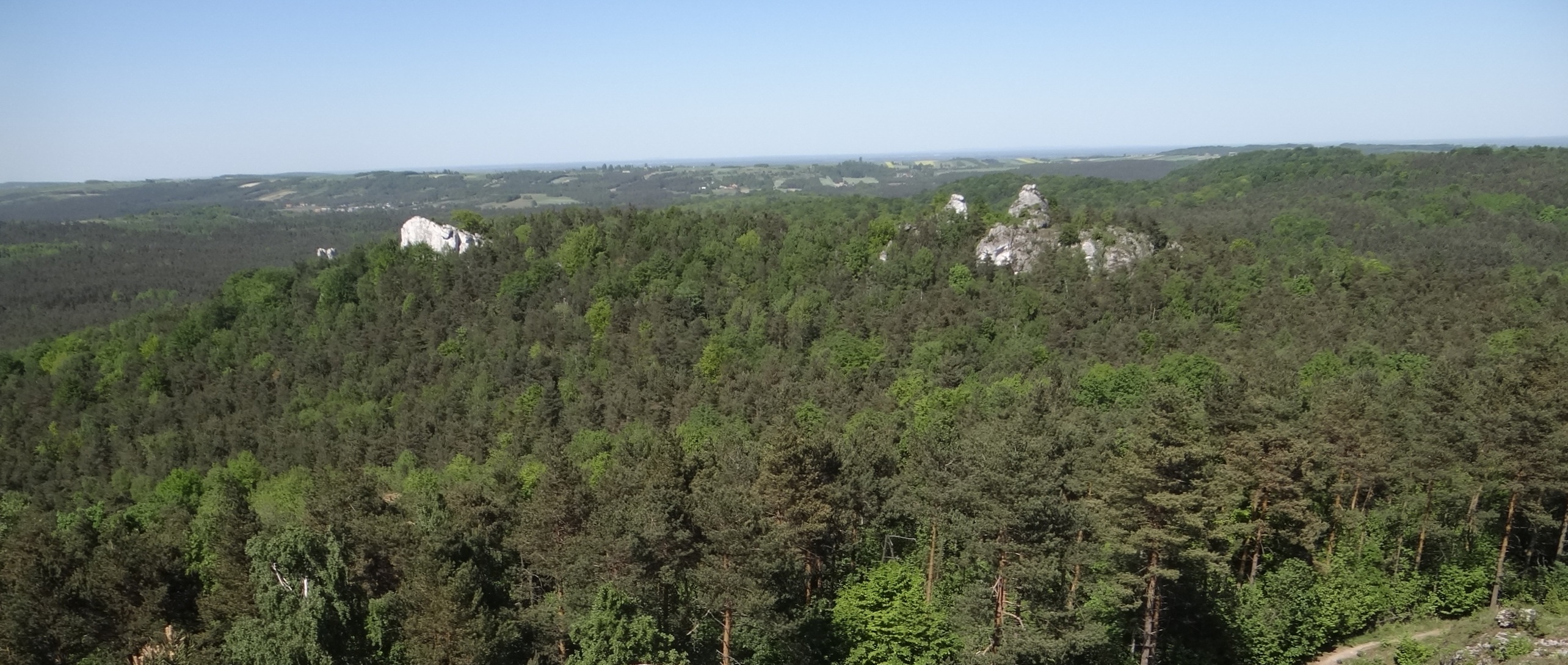 Wzgórze Kołoczek. Widoczna Głowa Cukru i Wielki Dziad